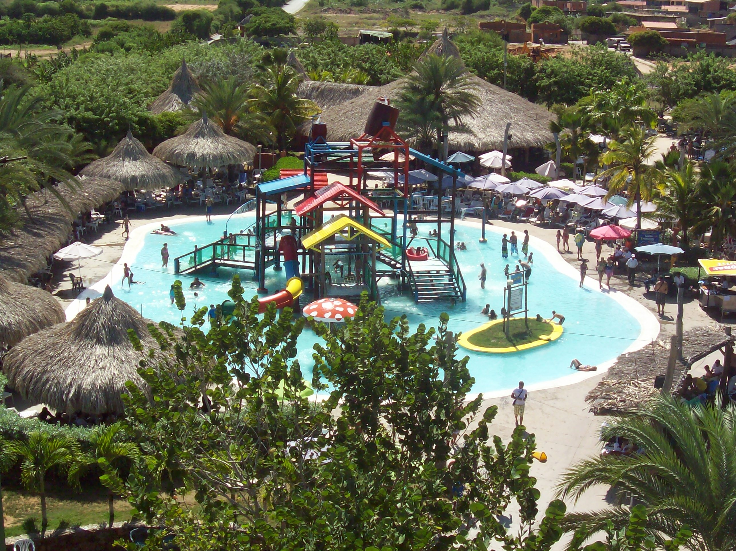 Piscina para niños